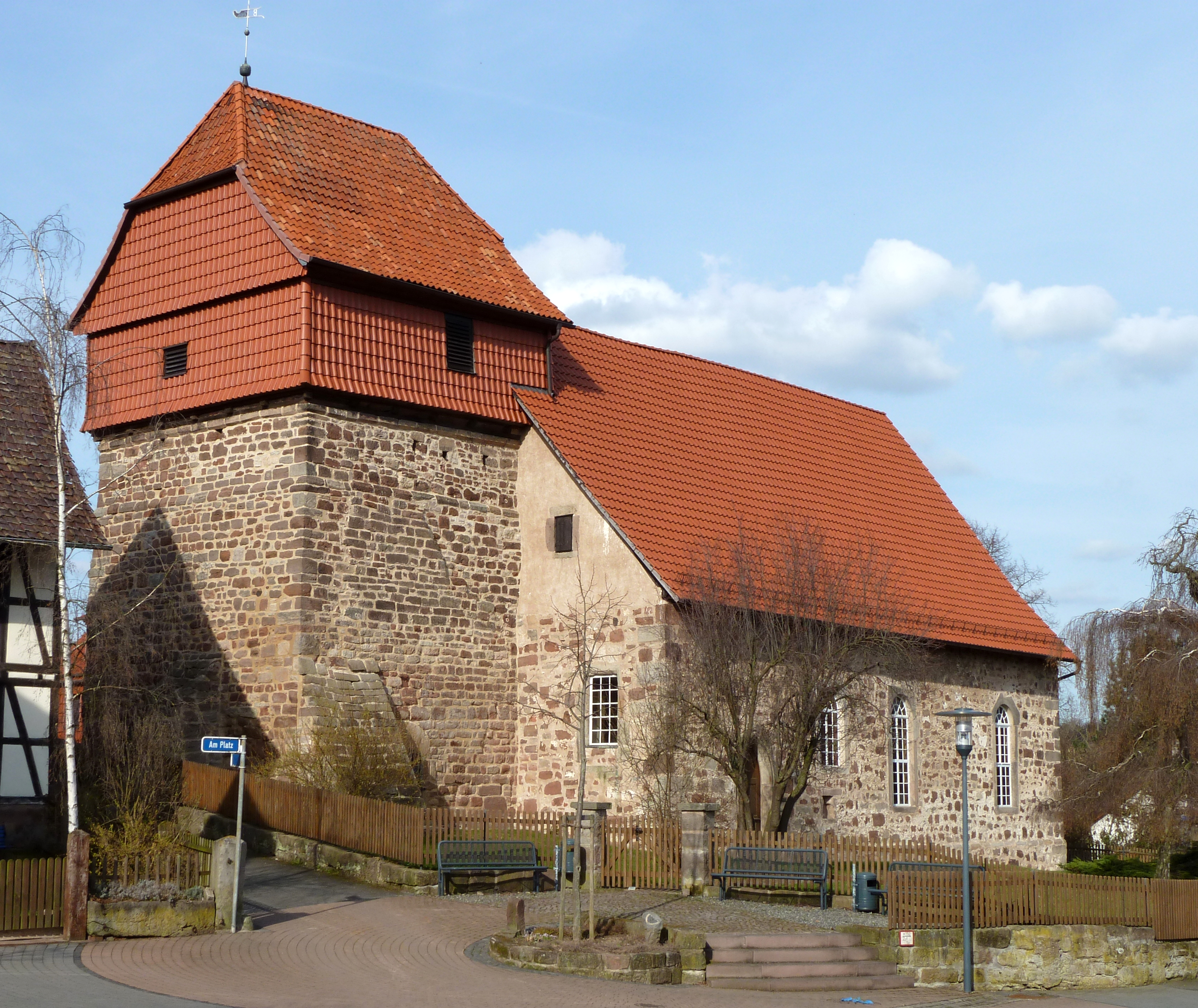 Ev. Kirche in Berge, Gemeinde Neu-Eichenberg, Landkreis Eschwege